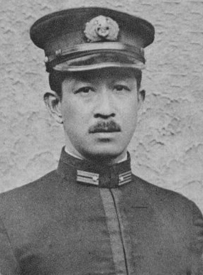 上野正雄伯爵 / Count Masao Ueno (1890–1965)